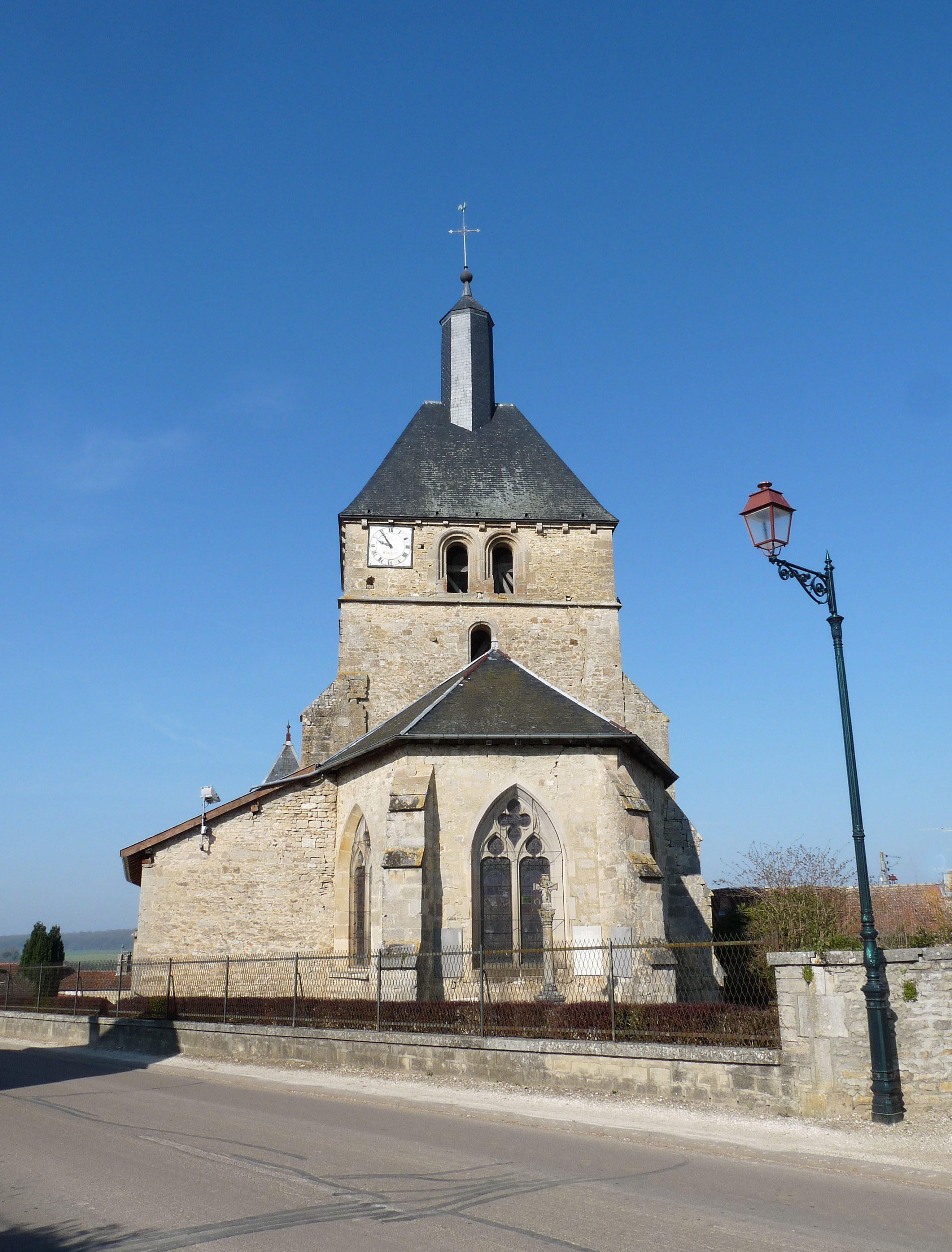 Eglise de Dommartin-le-Franc (Haute-Marne).